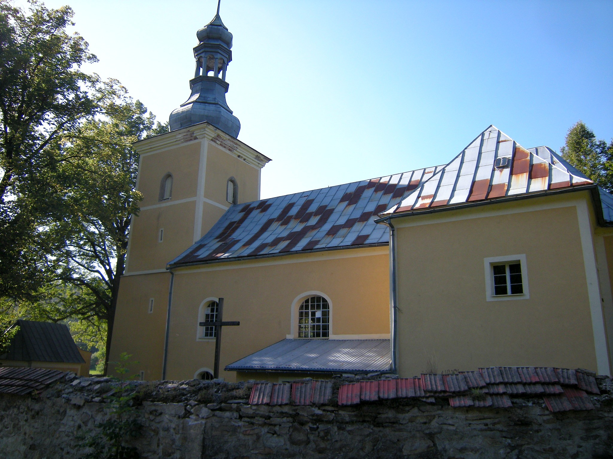 Kościół p.w. św. Sebastiana w Orłowcu (zabytek nr rejestr. 184/911)